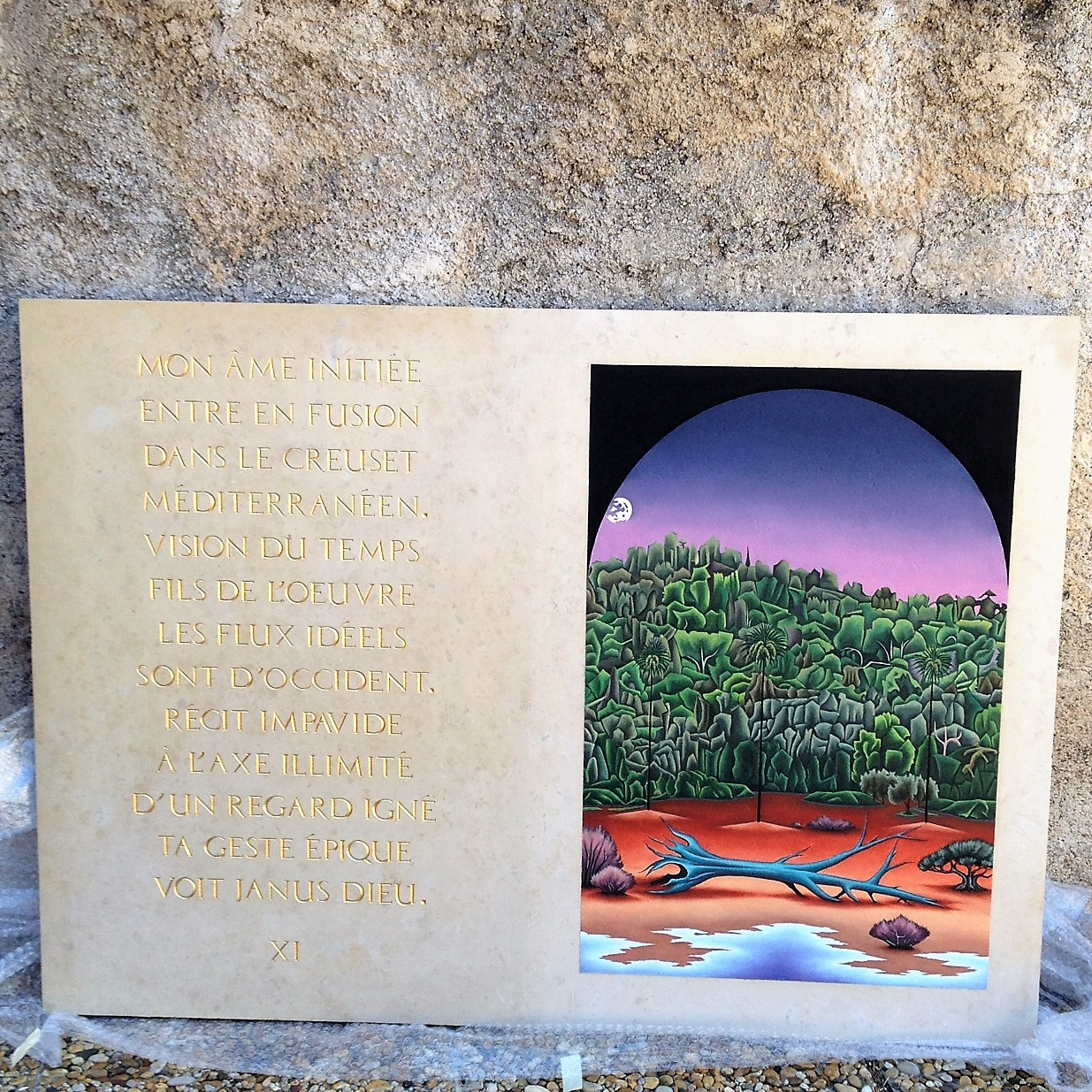 Une des Huit Dalles peintes, gravées et dorées en marbre de Tavel composant le Livre Delta des Figures de Gabriel Méxène